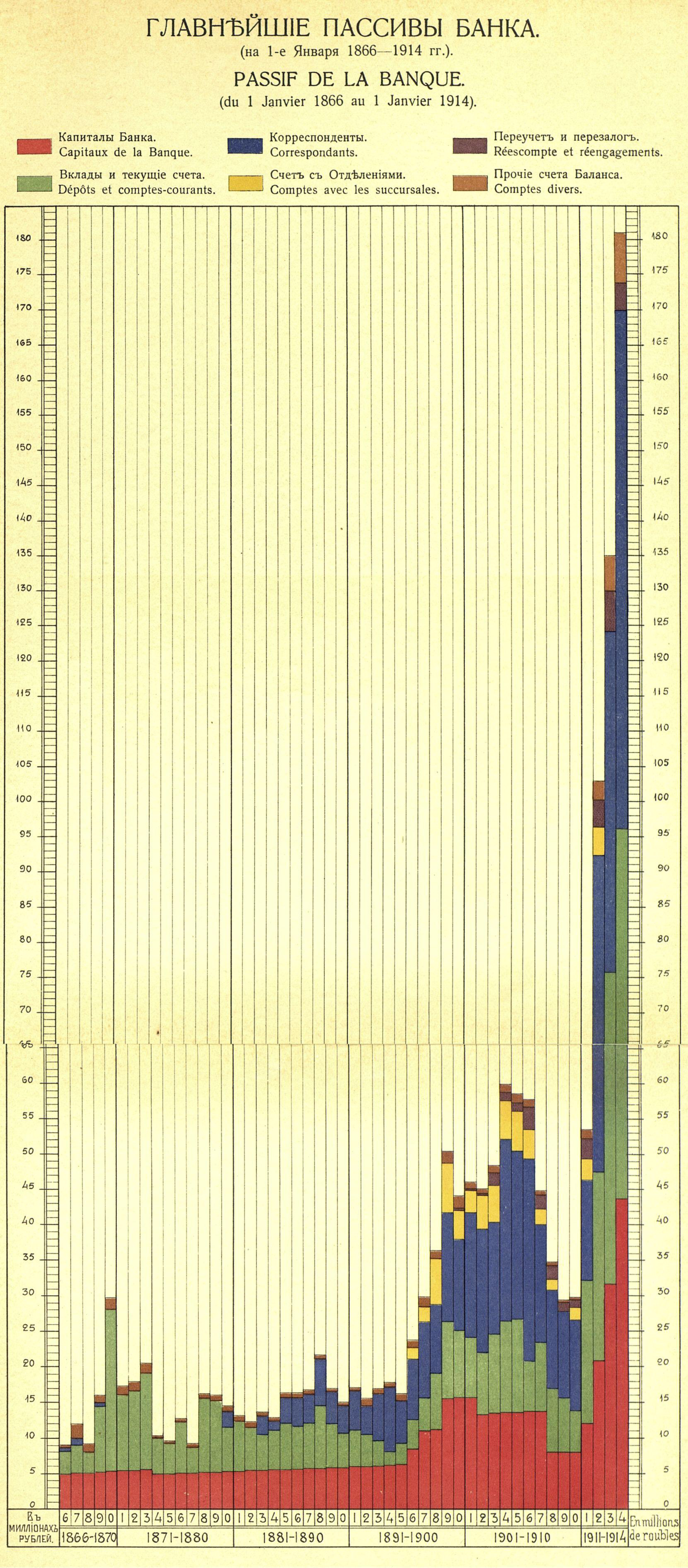 Пассивы Санкт-Петербургского частного коммерческого банка, 1864-1914